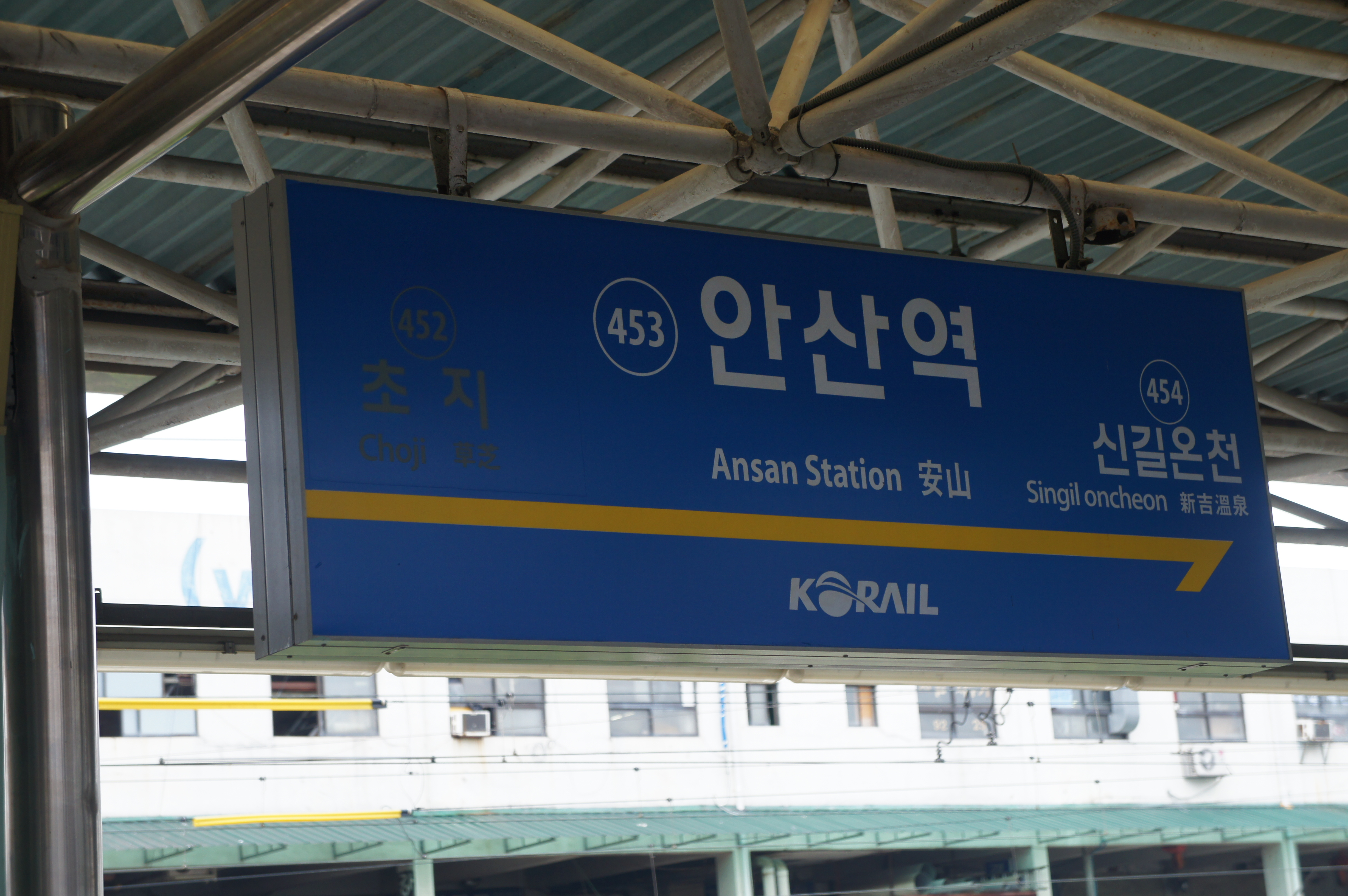 안산역 역명판